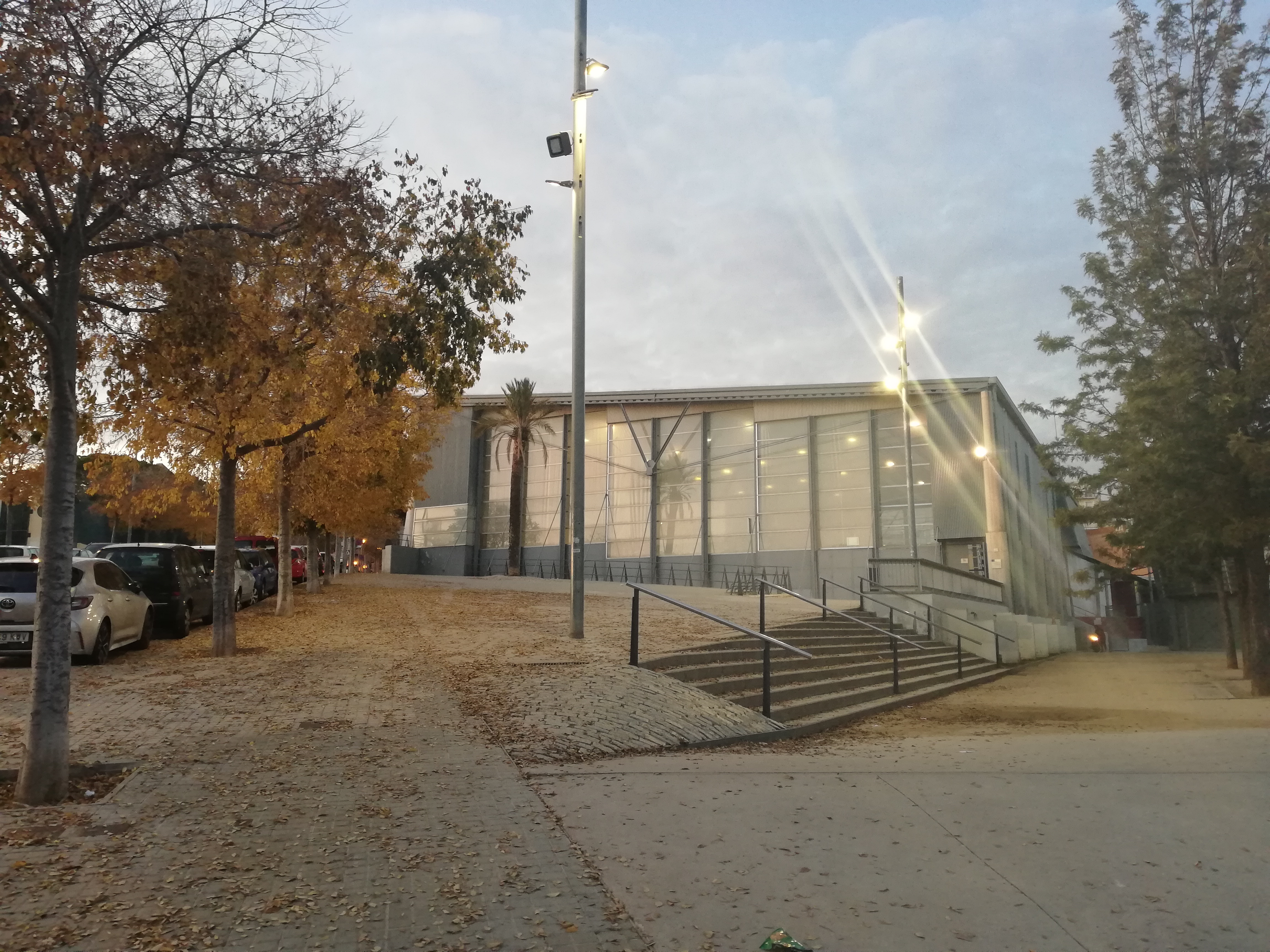 Pavelló Jaume Parera i Leon, on juga el CH Mataró, vist des de l'exterior